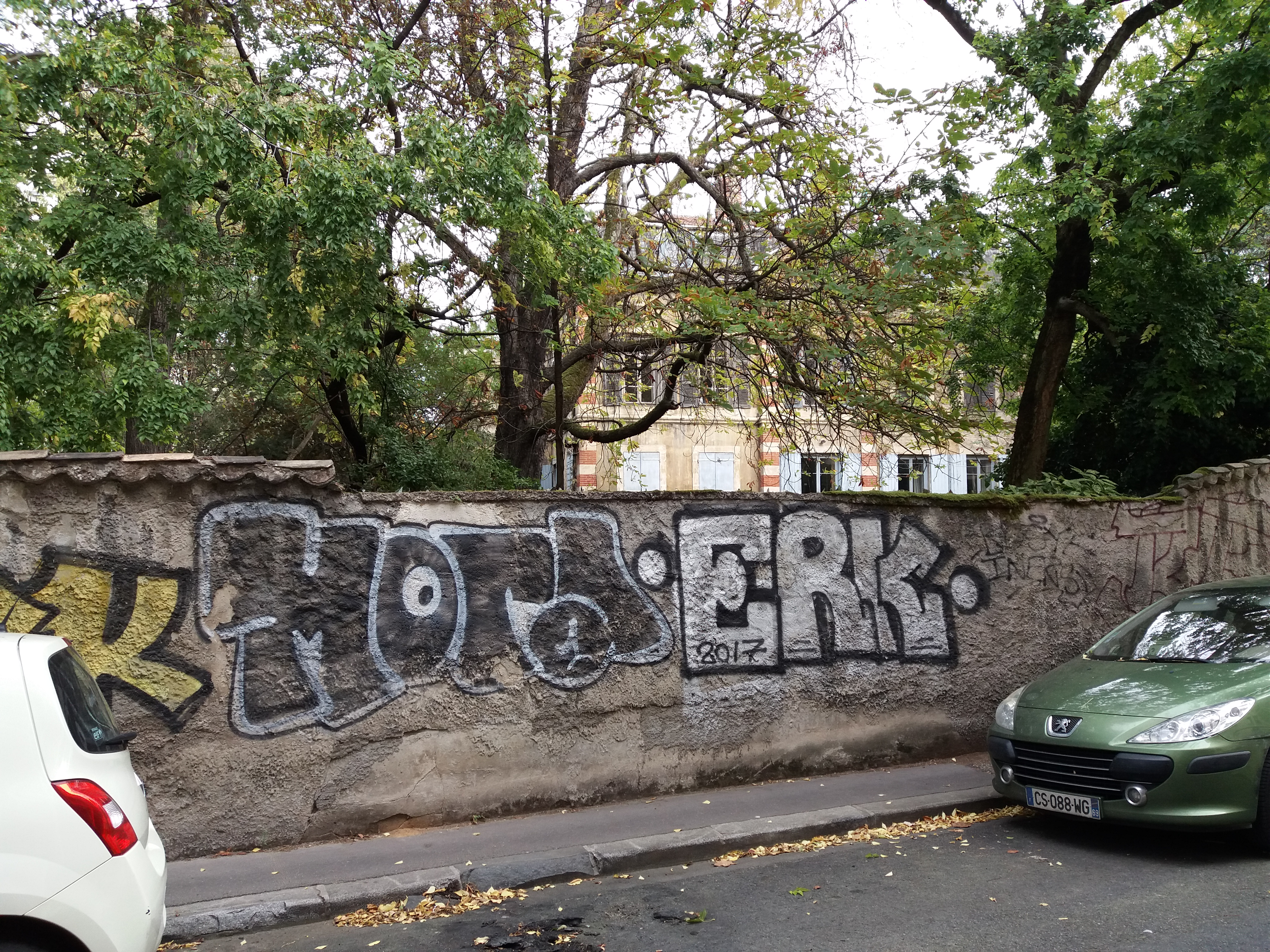 Villa monoyer derrière son mur.